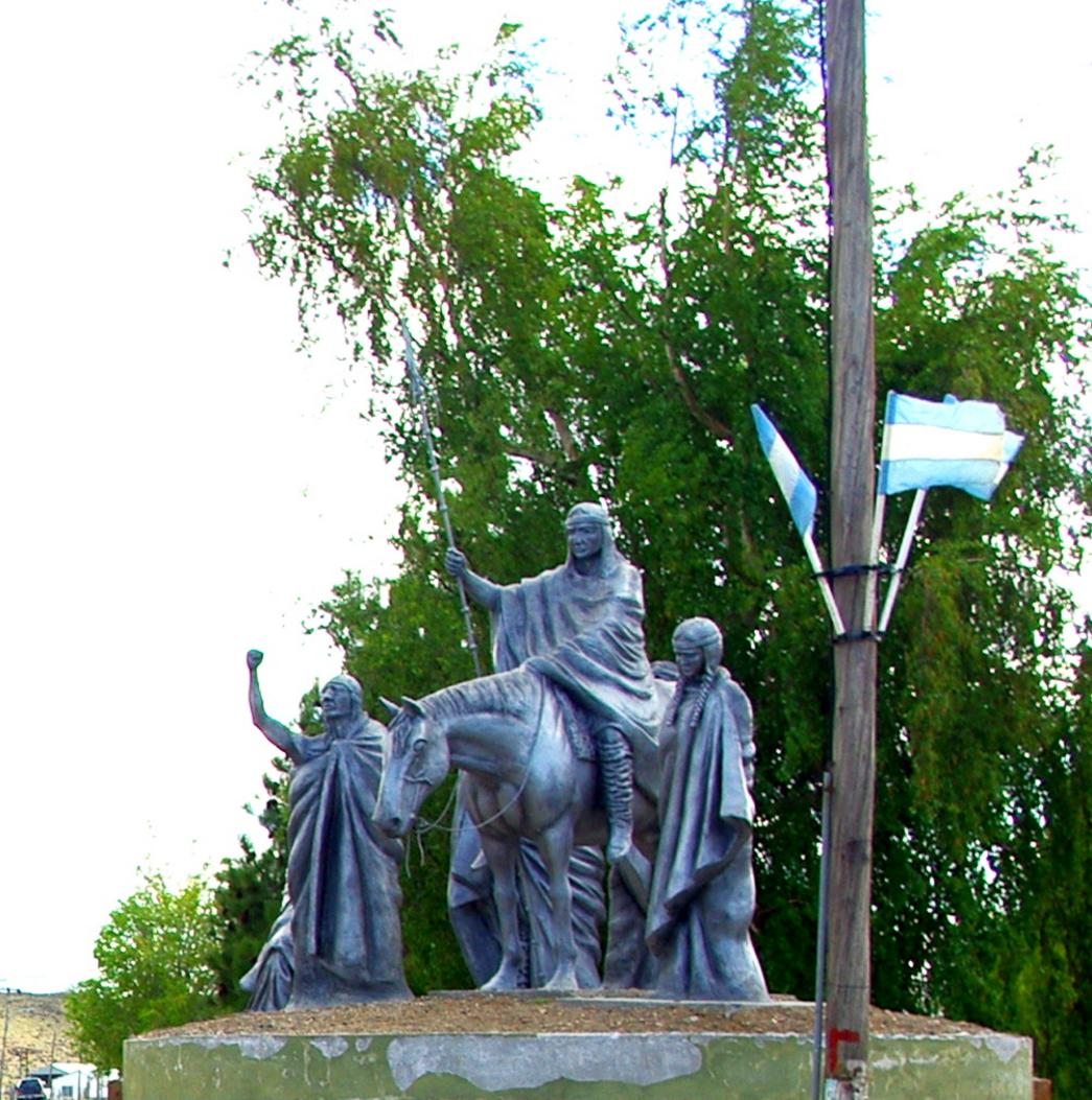 Este monumento al Cacique Casimiro Bigua, fue un cacique principal del pueblo Aonikenk o mapundungun de tehuelche entre 1840 a 1876. Su territorio abarcaba toda la patagonia desde el río Negro hasta estrecho de Magallanes y el 3de noviembre de 1869 juró fidelidad a la Bandera Argentina, comprometiéndose a defender los territorios.